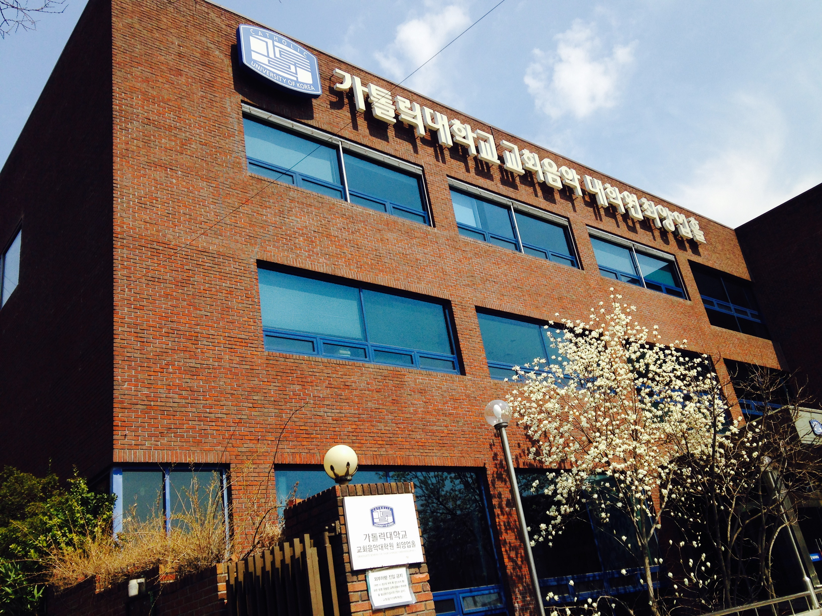 가톨릭대학교 교회음악대학원 최양업홀 정면